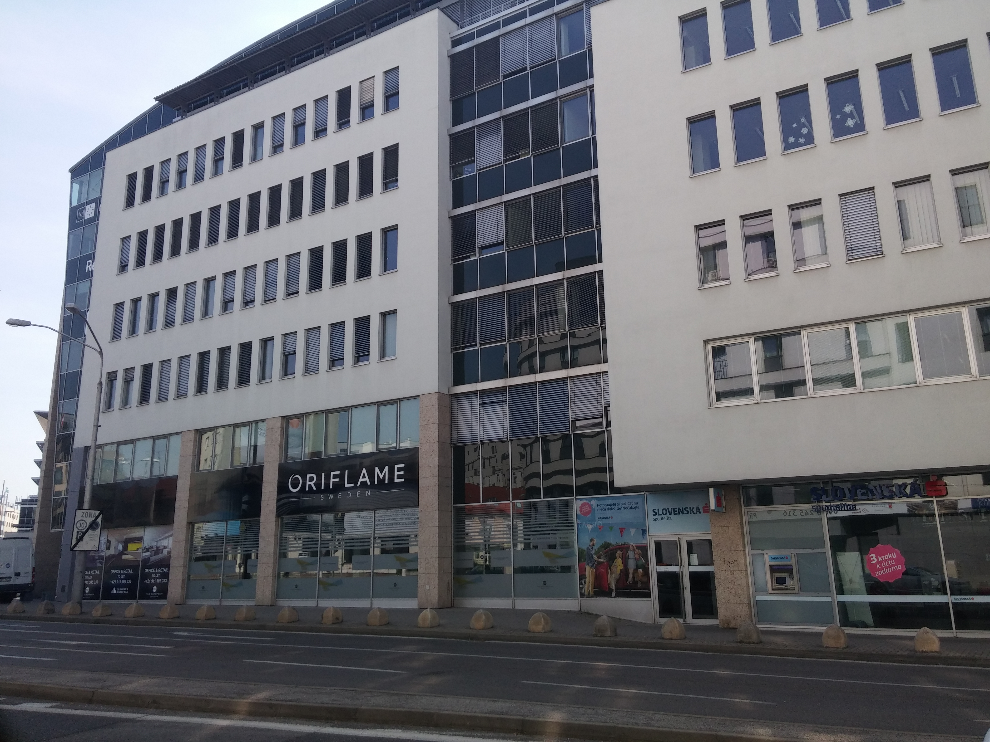 Suché mýto, Staré Mesto, Bratislava